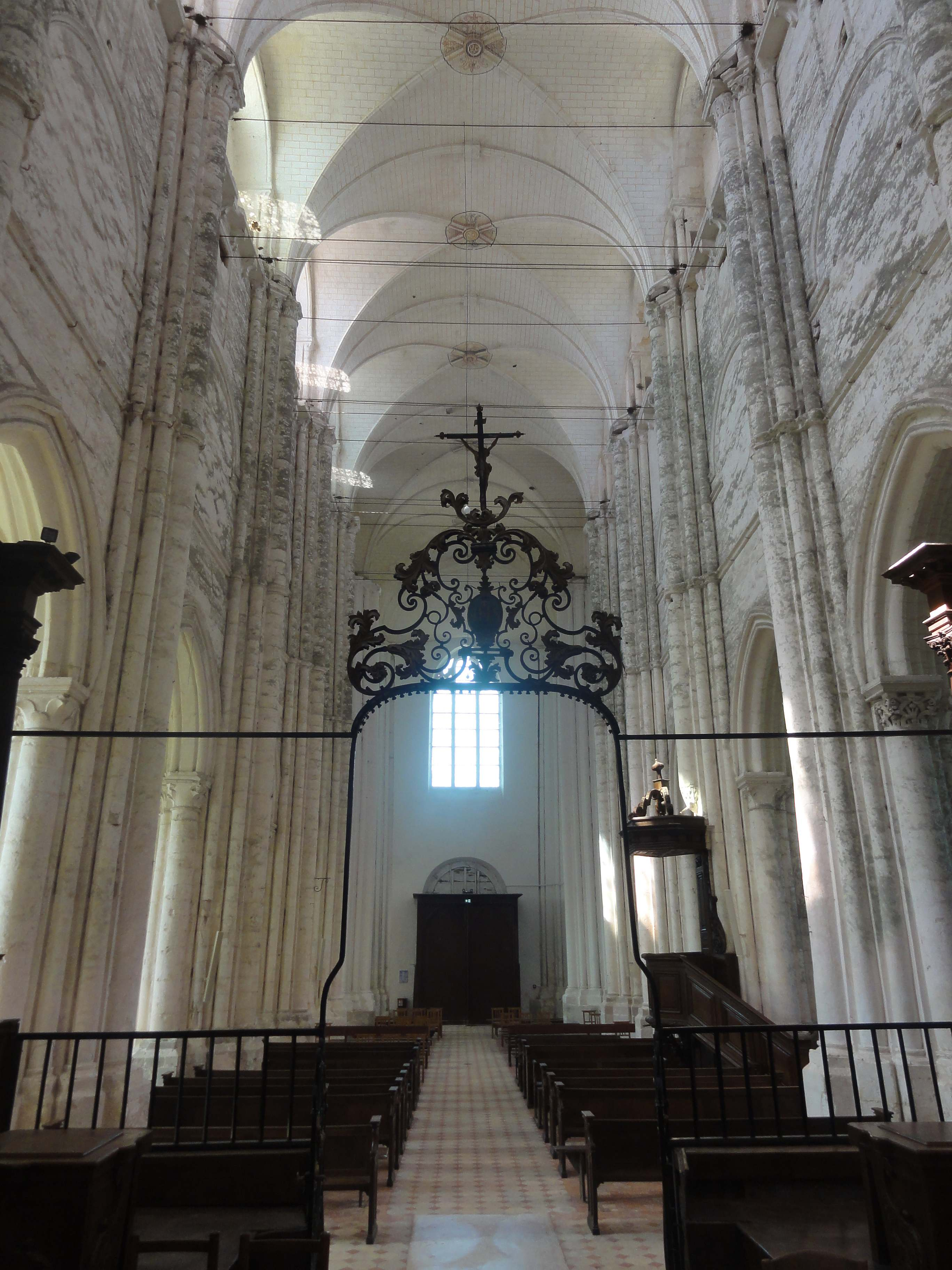 Nef, vue vers l'ouest.